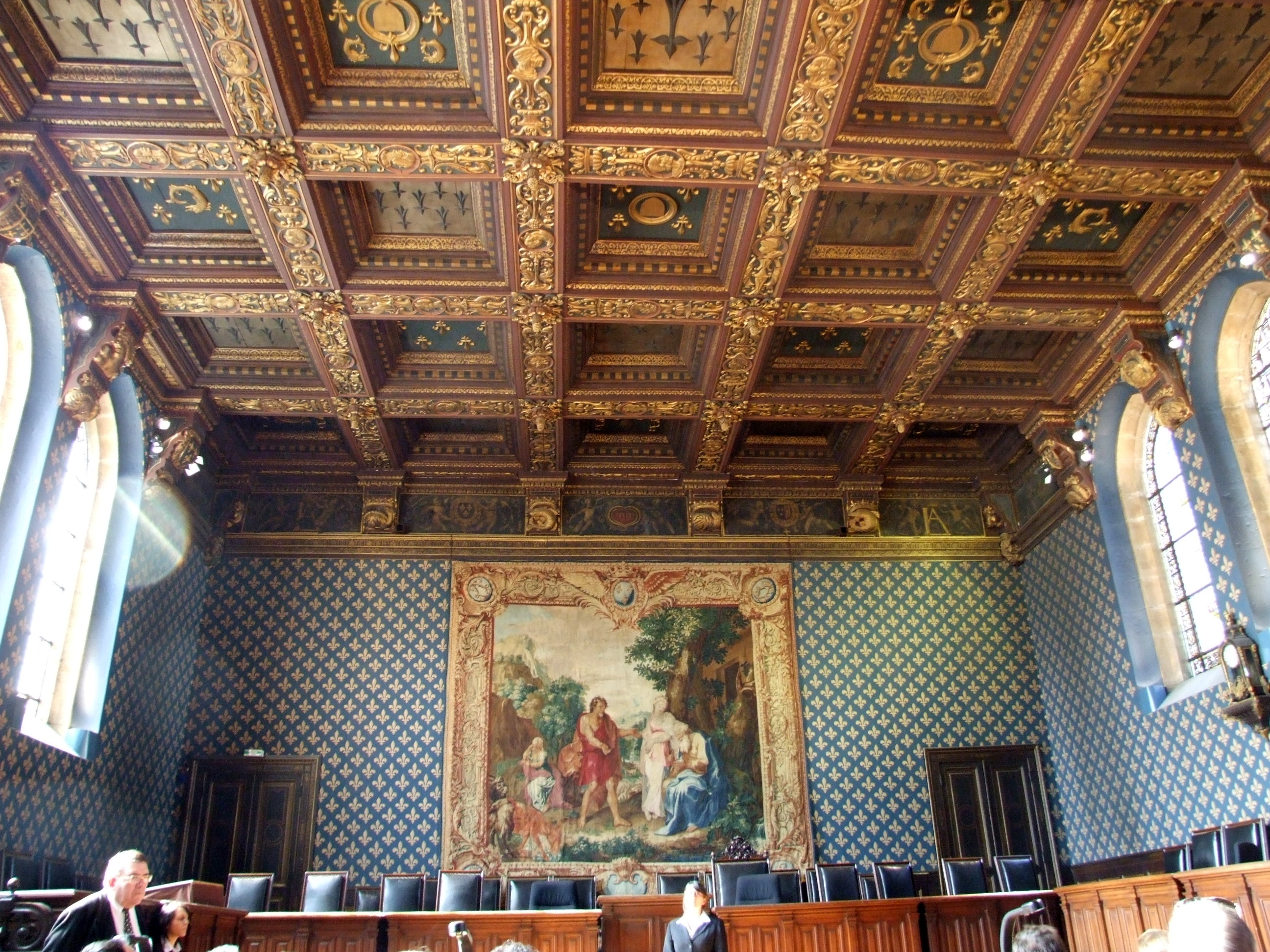 Palais de justice de Dijon, Dijon, Côte-d'Or, Bourgogne, FRANCE